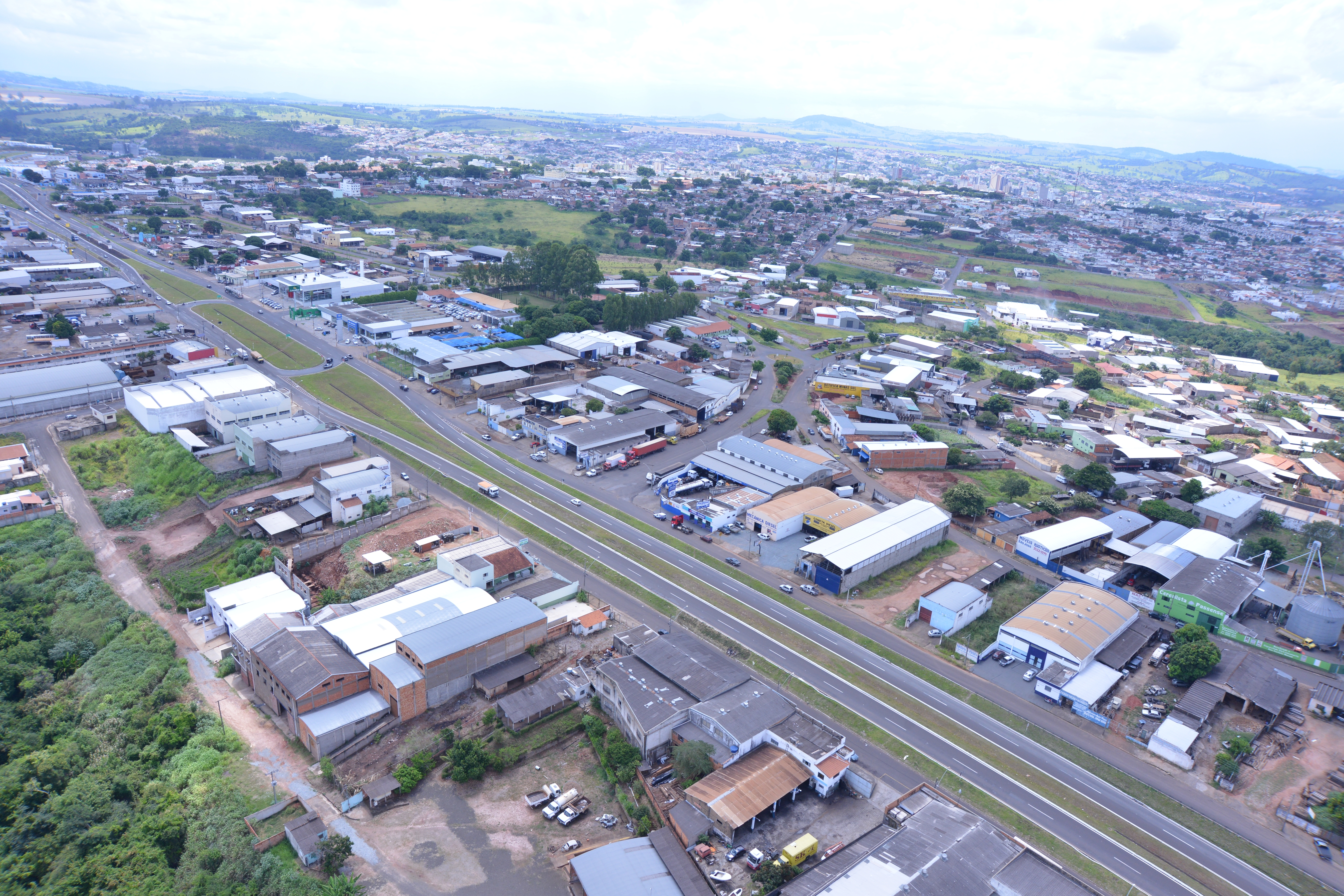 Vista aérea de trecho da Rodovia MG 050 na altura do trevo de Passos